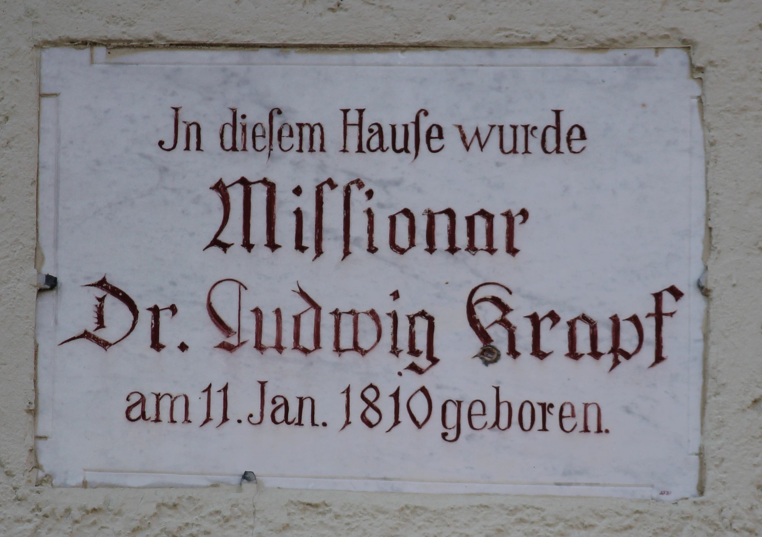 Erinnerungstafel am Geburtshaus von Johann Ludwig Krapf in der in der Sieben-Höfe-Straße 34 in Tübingen-Derendingen. Inschrift: In diesem Hause wurde Missionar Dr. Ludwig Krapf am 11. Jan. 1810 geboren.